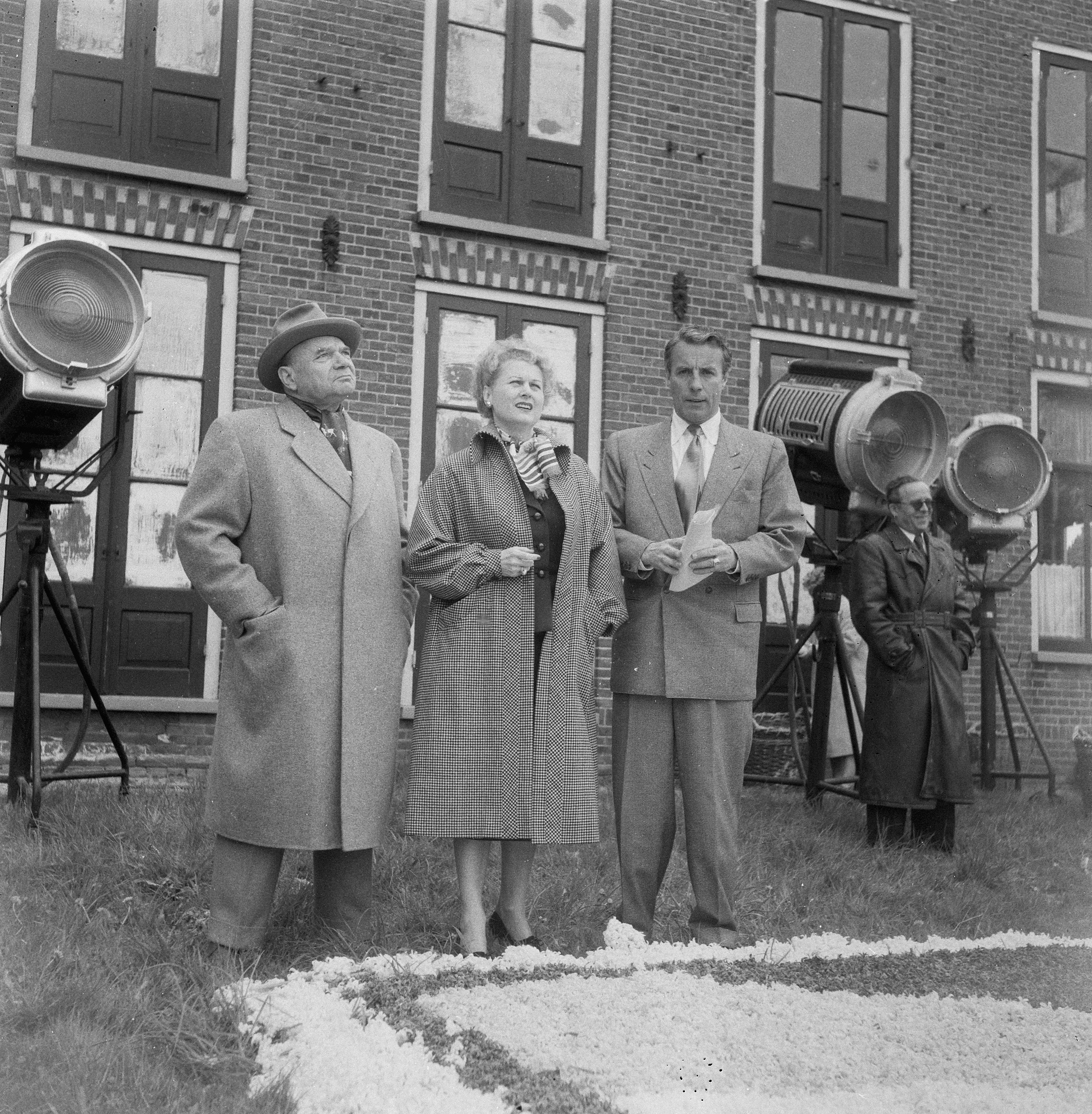 Collectie / Archief : Fotocollectie Anefo Reportage / Serie : [ onbekend ] Beschrijving : Marika Rokk en Johan Heesters bij filmopnamen in de bollenstreek Datum : 26 april 1953 Trefwoorden : acteurs, actrices, films, zangeressen, zangers Persoonsnaam : Heesters, Johan, Rokk, Marika Fotograaf : Oorschot, […] van / Anefo Auteursrechthebbende : Nationaal Archief Materiaalsoort : Negatief (zwart/wit) Nummer archiefinventaris : bekijk toegang 2.24.01.03 Bestanddeelnummer : 905-6889